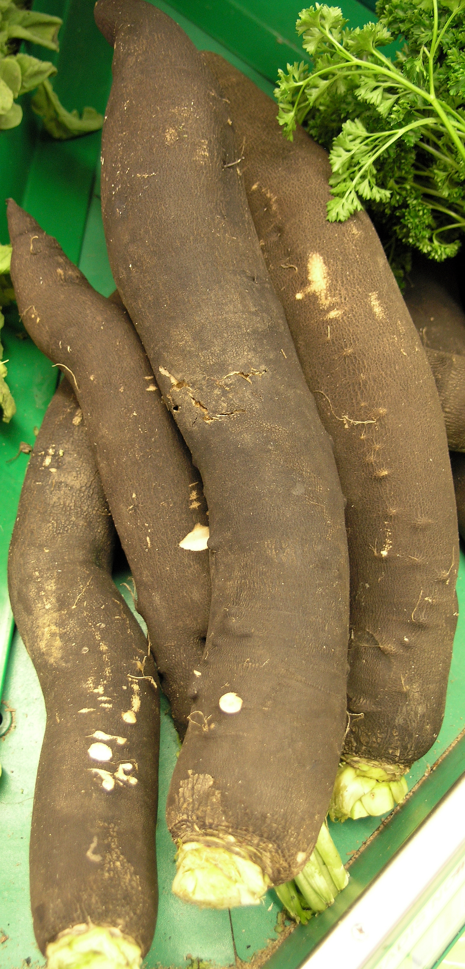 Schwazer Rettich, Raphanus sativus subsp. niger var. niger